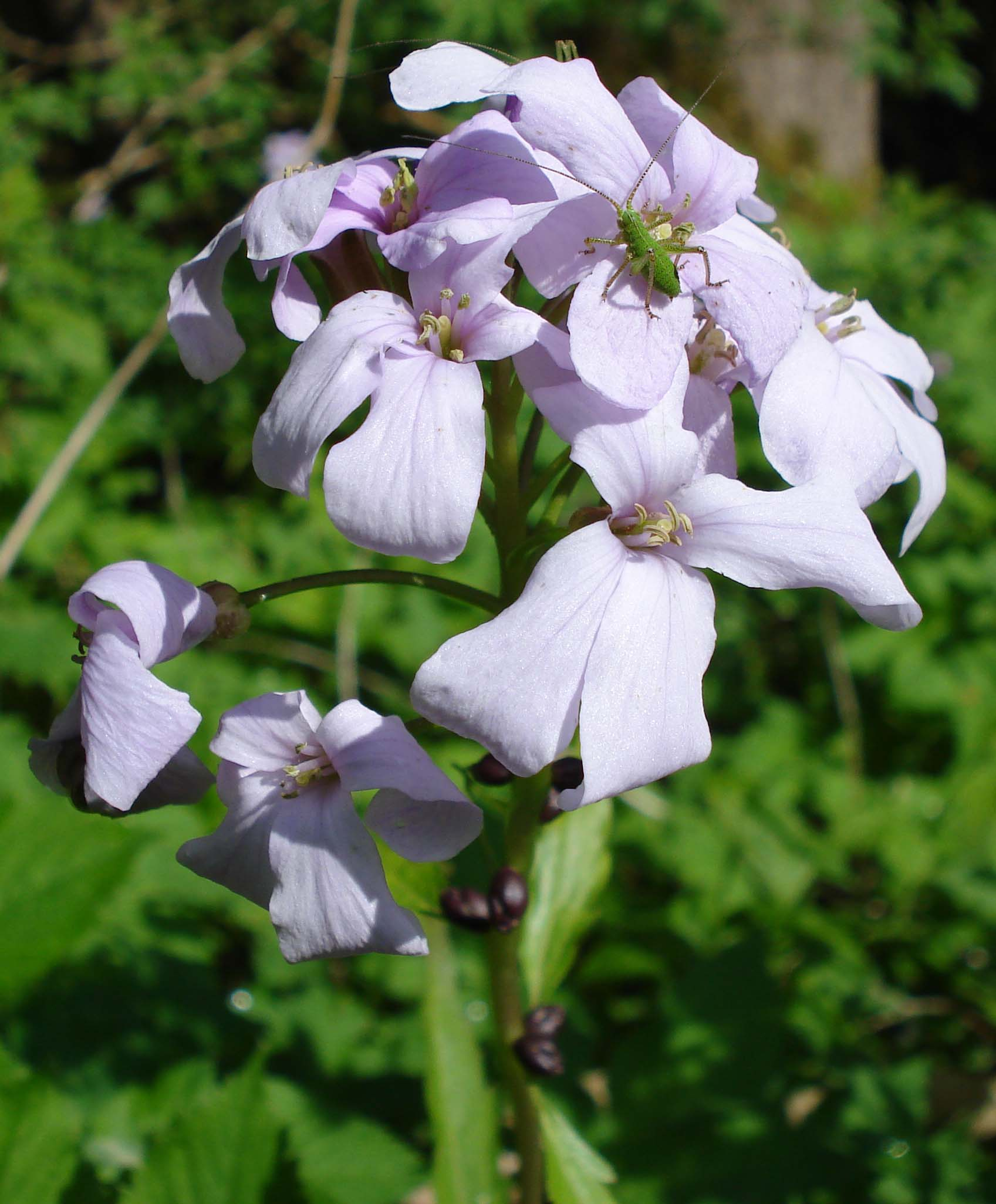 Cardamine bulbifera (Unterfranken, Germany) with Leptophyes punctatissima Zwiebel-Zahnwurz (Unterfranken, Deutschland) mit Punktierter Zartschrecke